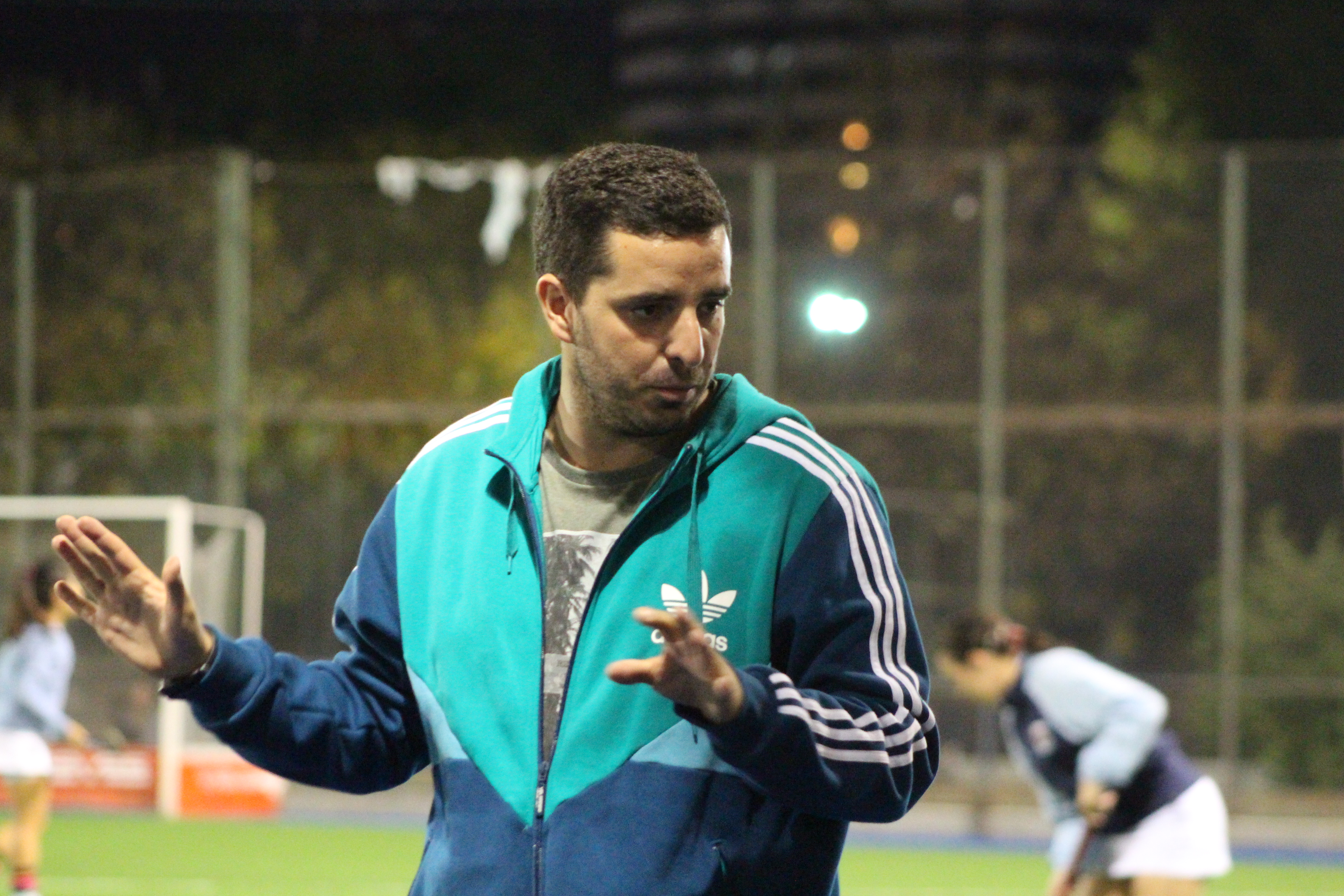 Julian Potenzoni